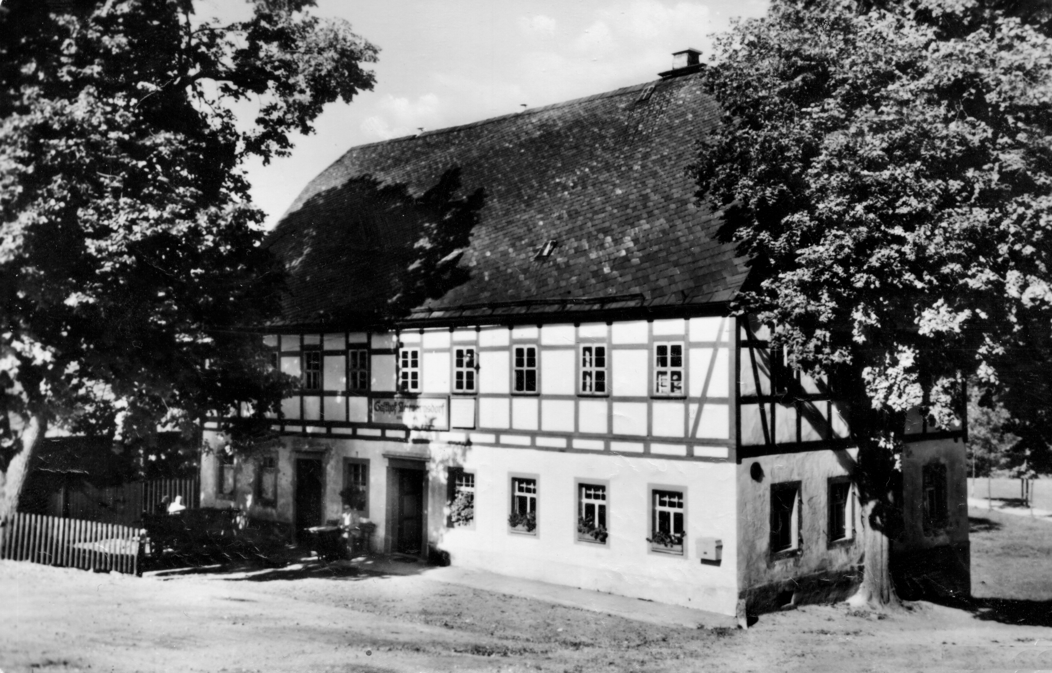 Der durch den Talsperrenbau abgerissene Gasthof in Neuwernsdorf